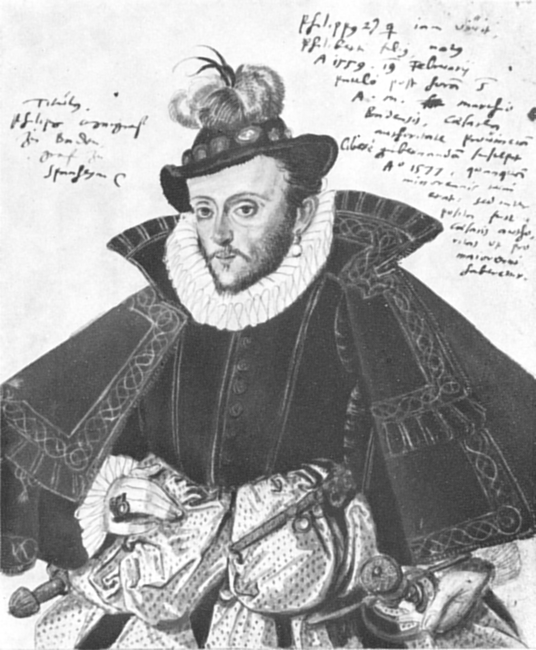 Philipp II. von Baden (1559–1588), 1571–1588 Markgraf von Baden-Baden, ab 1577 selbst regierend. Aquarellstudie (28 * 21 cm) zu einem Gemälde, welches beim Brand des Schlosses Baden-Baden 1689 zerstört wurde. Die Reproduktion wurde um 1960 von einer Fotografie im Historischen Museum Rastatt abgenommen. Das Aquarell war 1962 im neuen Schloß von Baden-Baden ausgestellt.